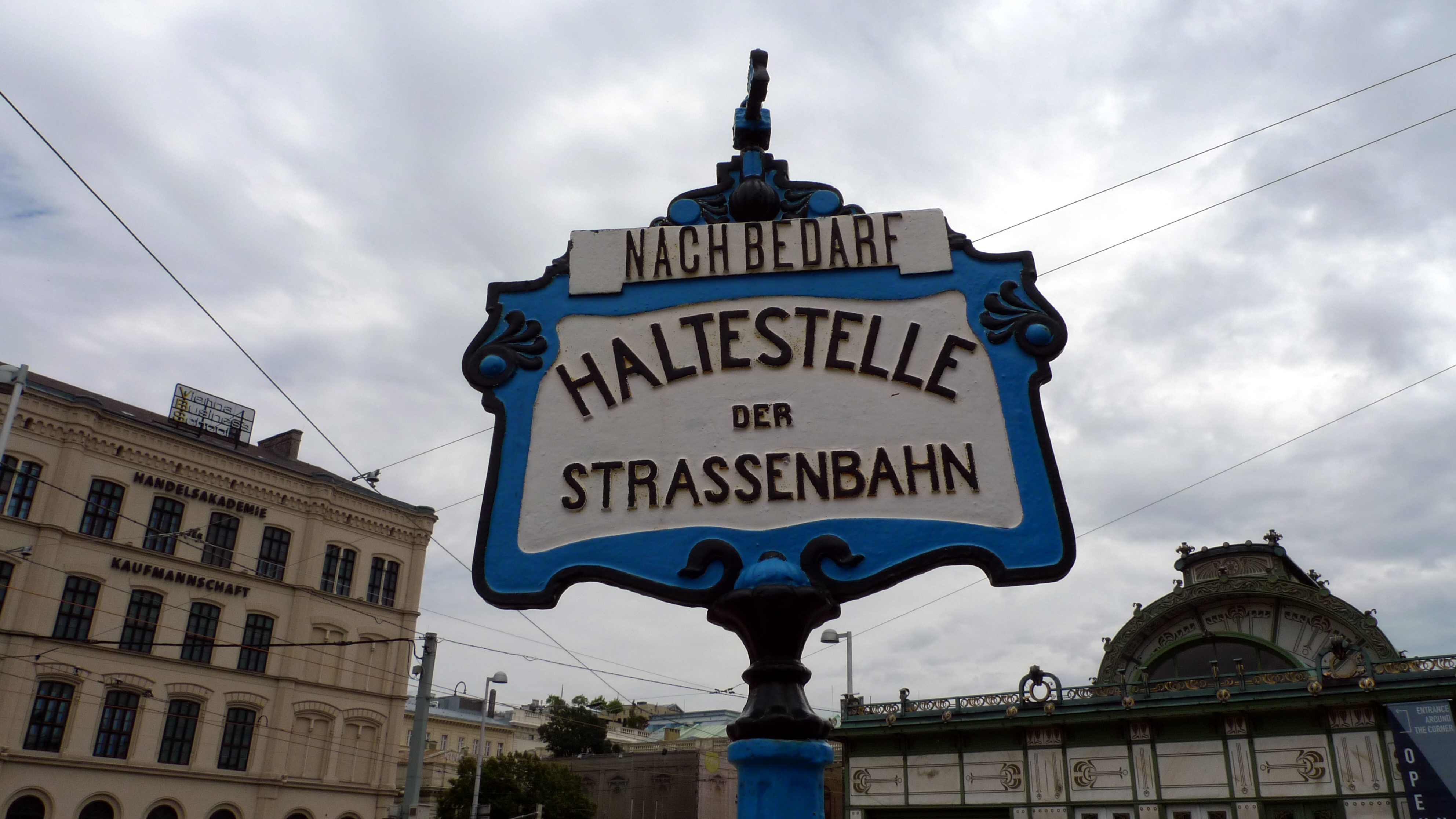 L1080849